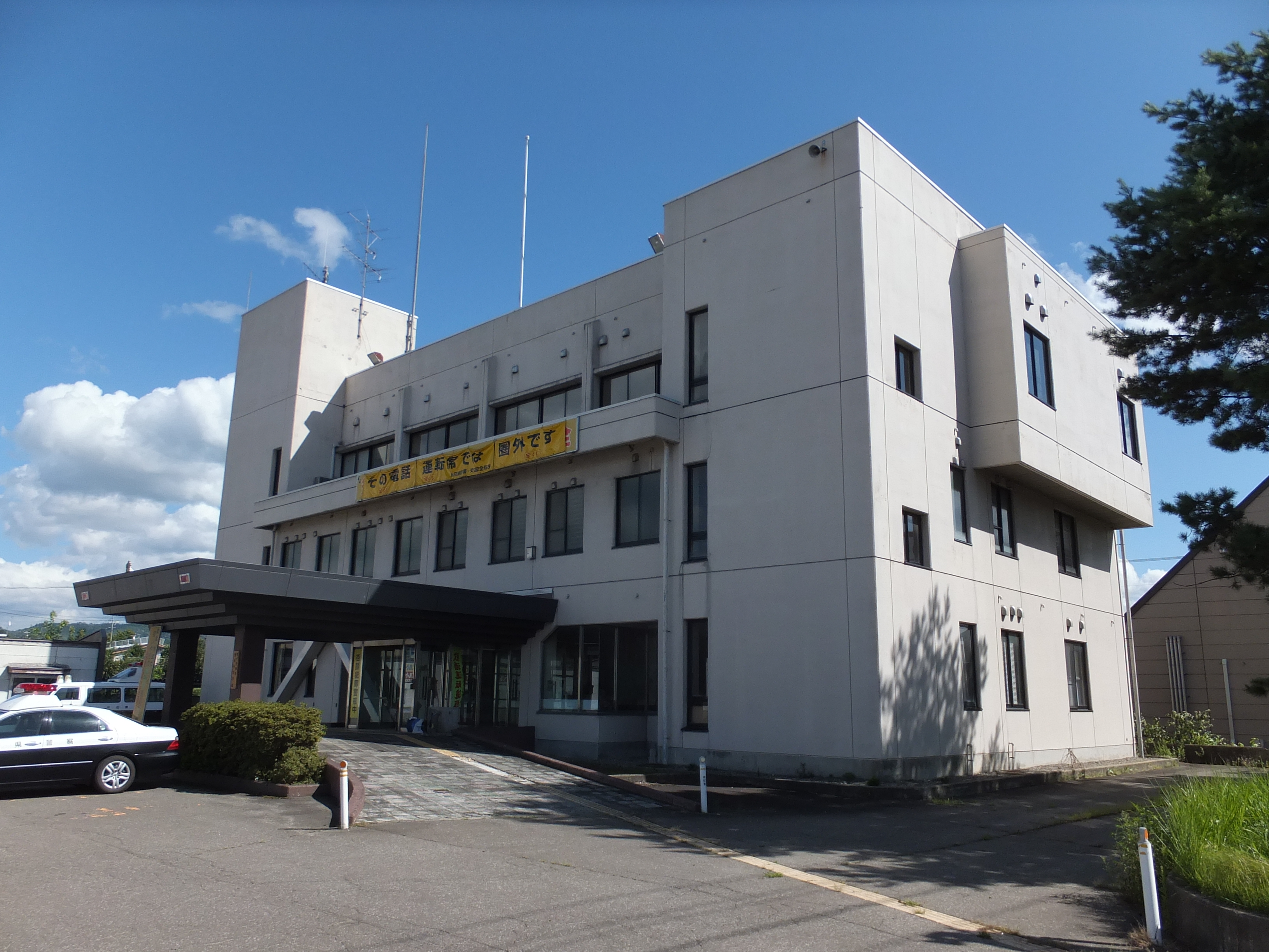 秋田県警横手警察署増田幹部交番。かつて増田警察署だったものが組織改編により幹部交番になったもの。